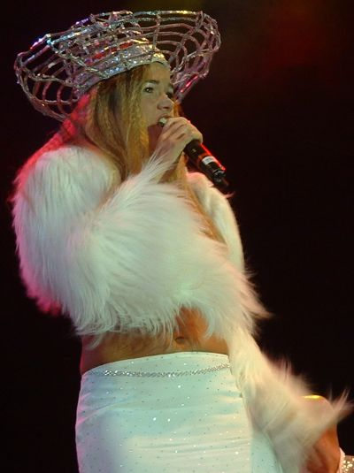 Anke Engelke